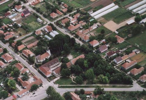 Fülöpjakab, Hungary, aerialphotography